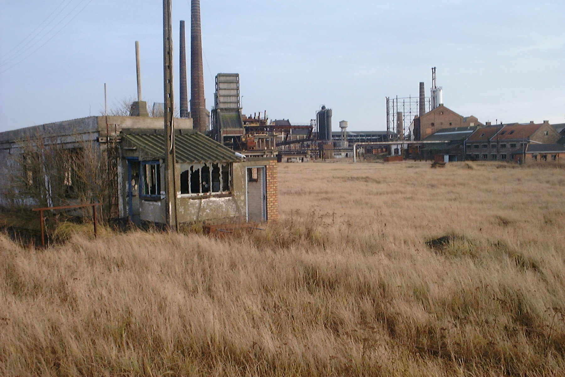 Inmiddels gesloopte Carcokefabrieken te Zwankendamme